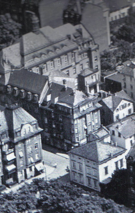 Frankfurt Bockenheim, Eckgebäude Rohmerstraße-Große Seestraße, Vorkriegsaufnahme